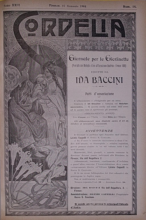 Cordelia, rivista fondata da De Gubernatis e diretta dal 1884 al 1911